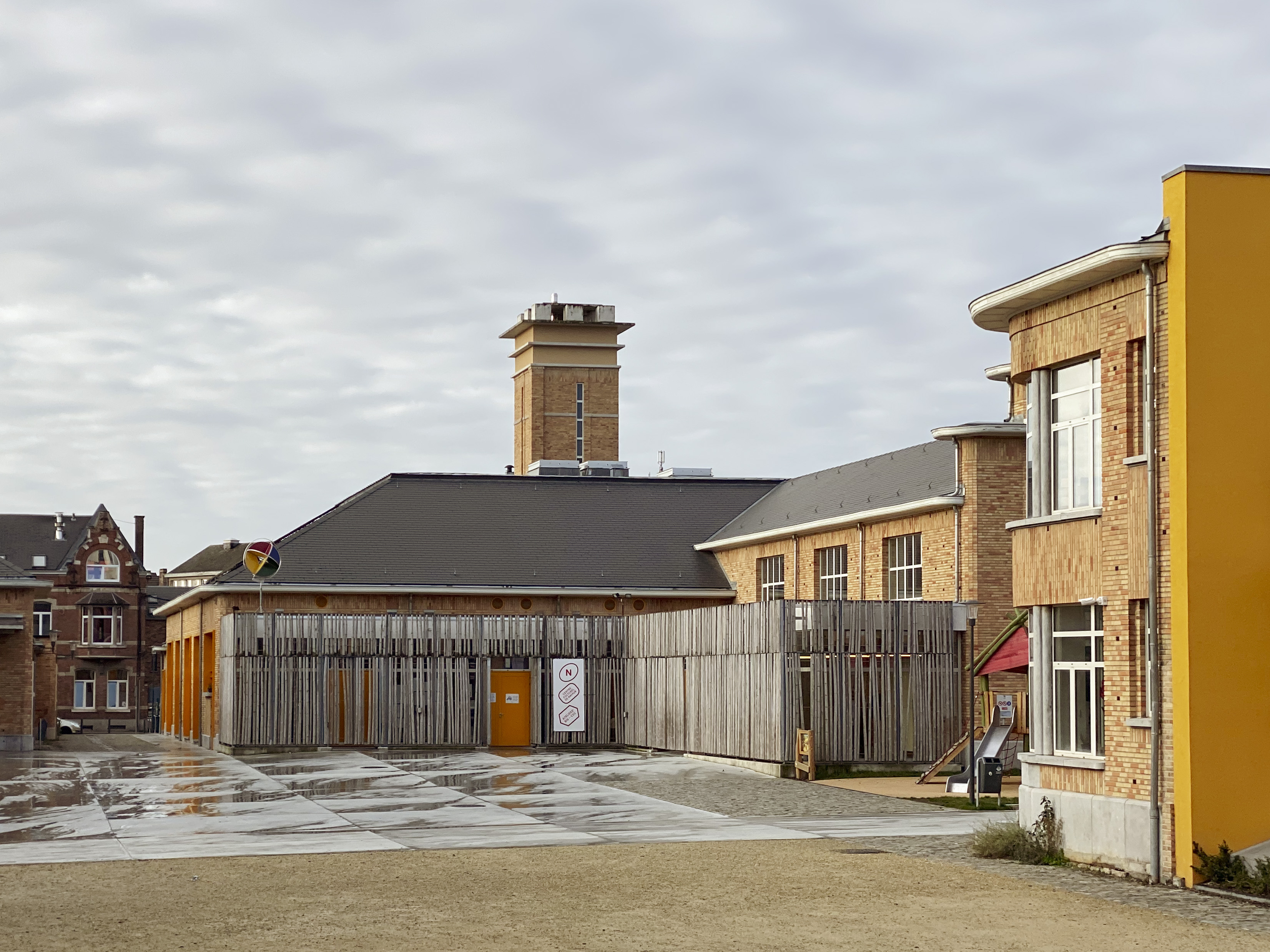 Les Abattoirs de Bomel - Centre culturel de Namur